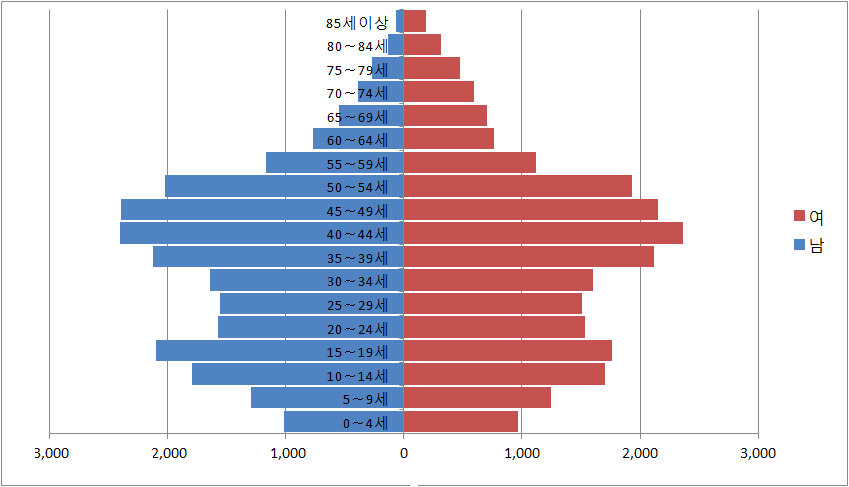 부천시 성곡동 인구 구조